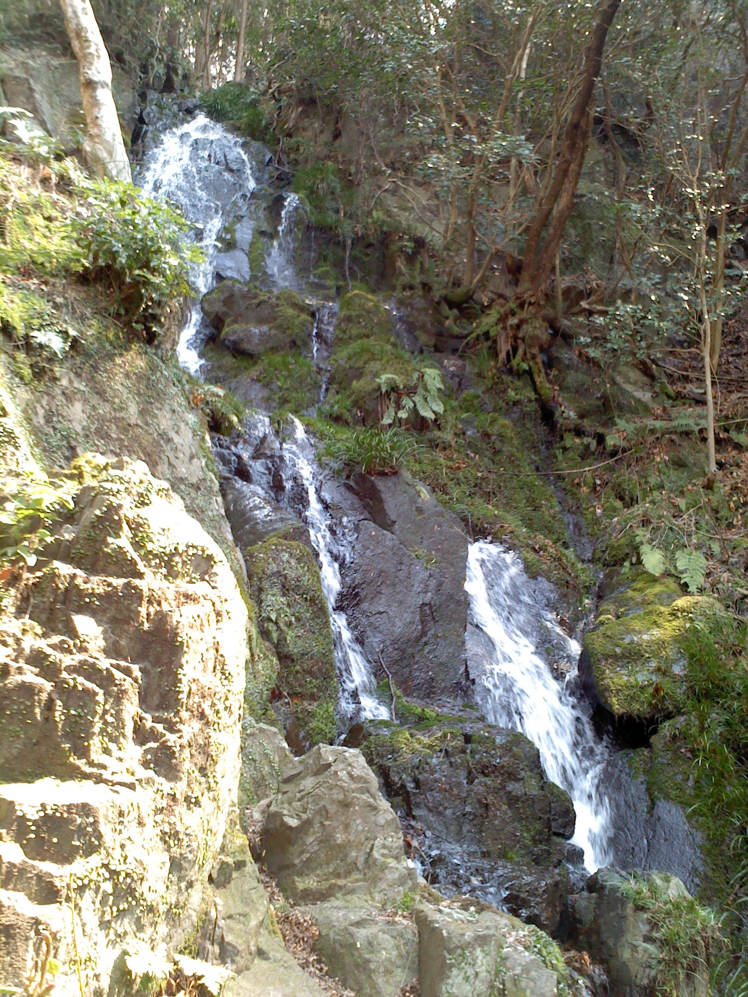 大文字山・如意越え・楼門の滝。2012年春。